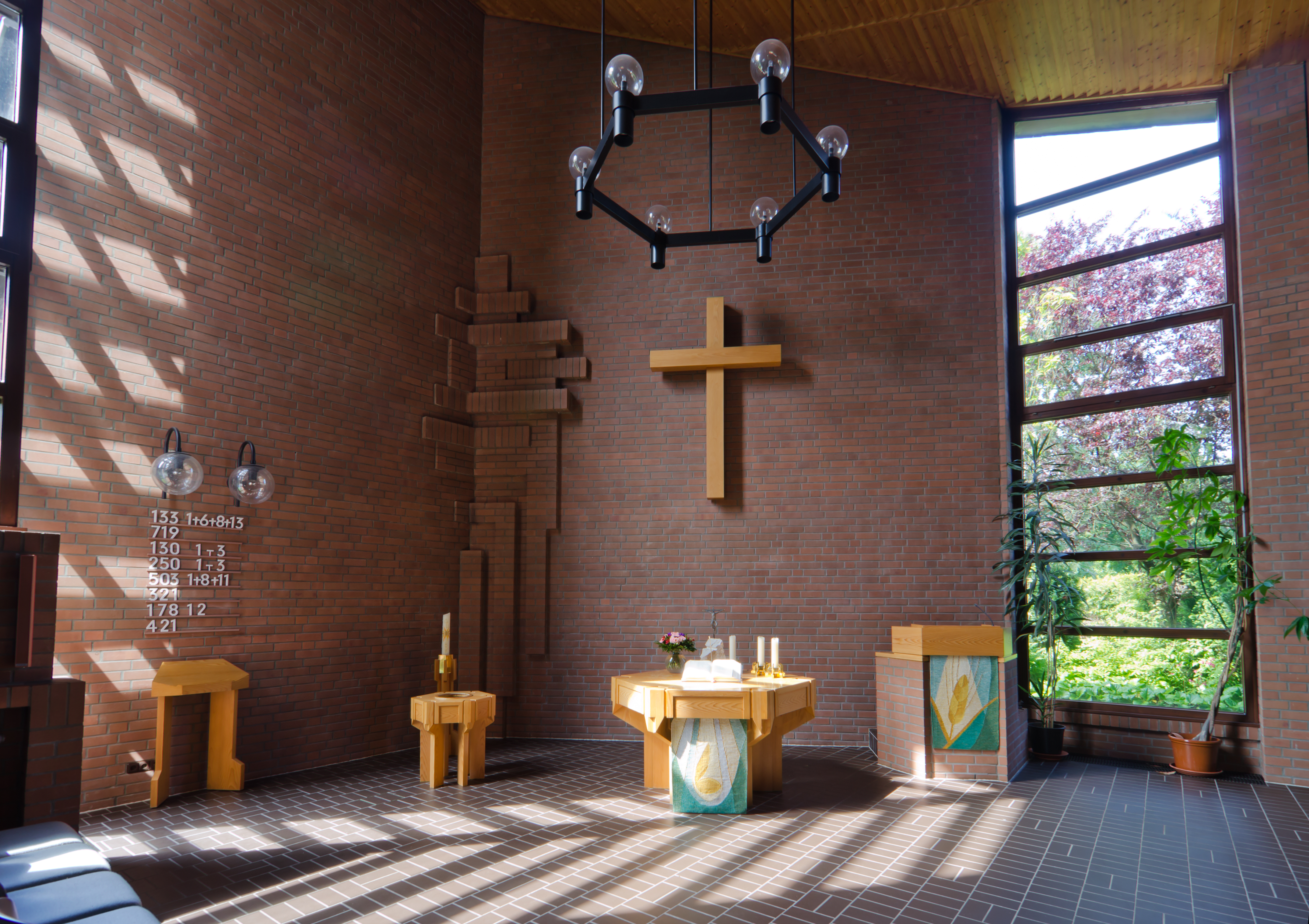 Matthias-Claudius-Kirche Oldenfelde innen